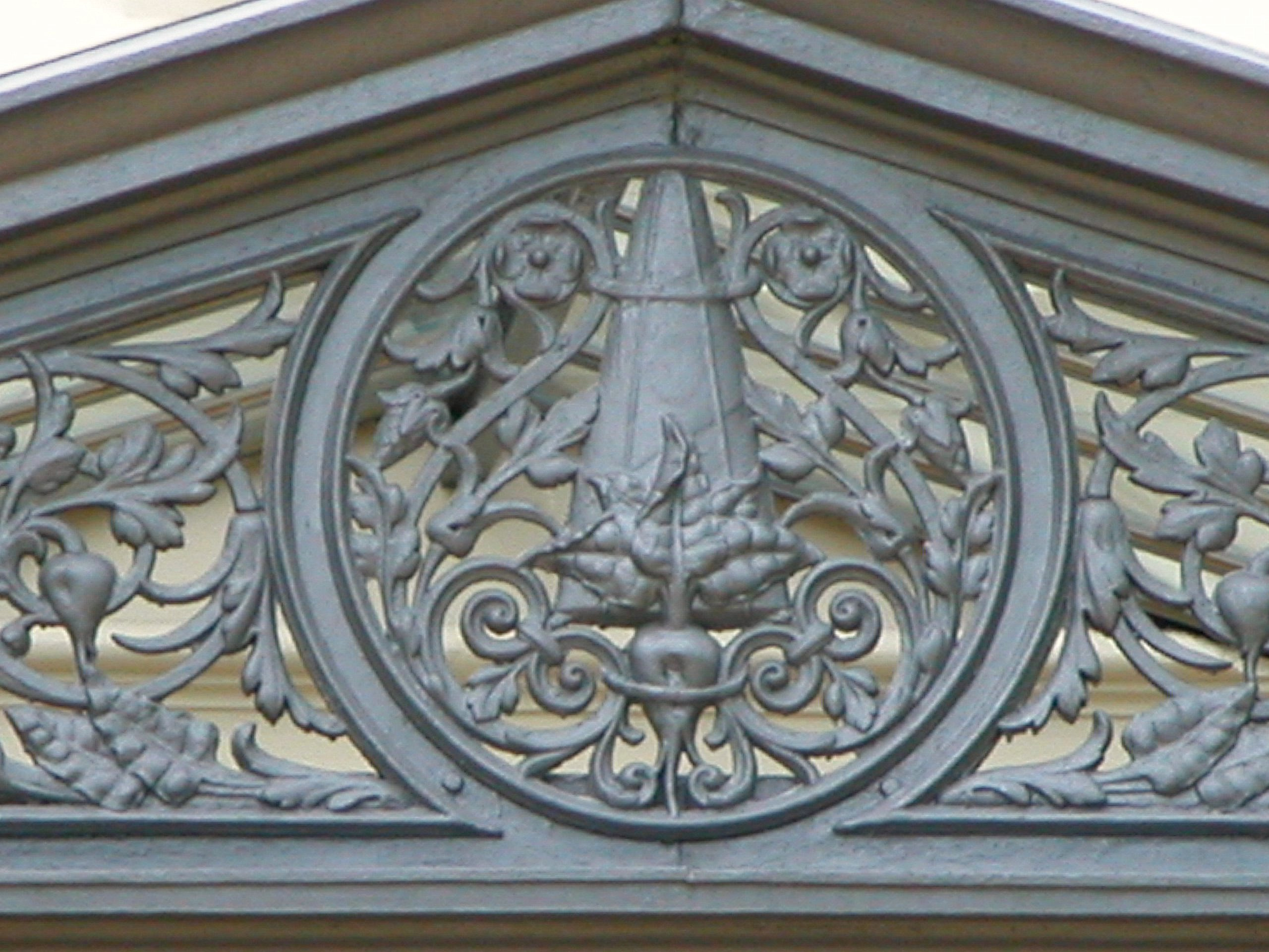 Braunschweig: Villa Gerloff: Zuckerhut und Zuckerrübe. Braunschweig, Germany: Gerloff’s Villa: Sugar cone and sugar beet.